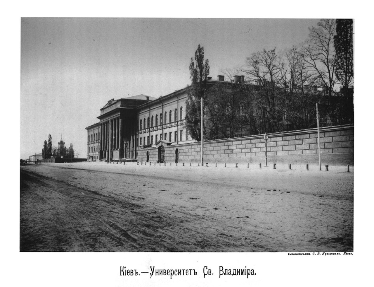 Університет Св.Володимира Київ (St.Vladimir's University, Kyiv) 1888